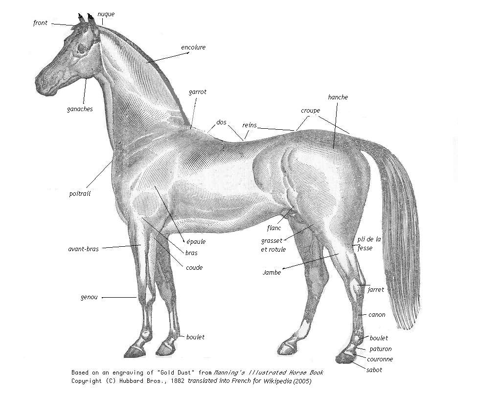 Légende des parties d'un cheval en français. D'après l'image [